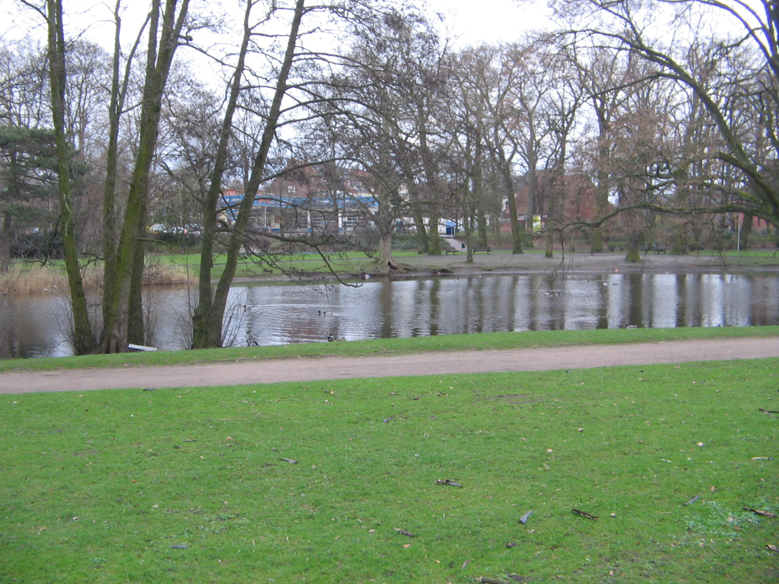 Waller See